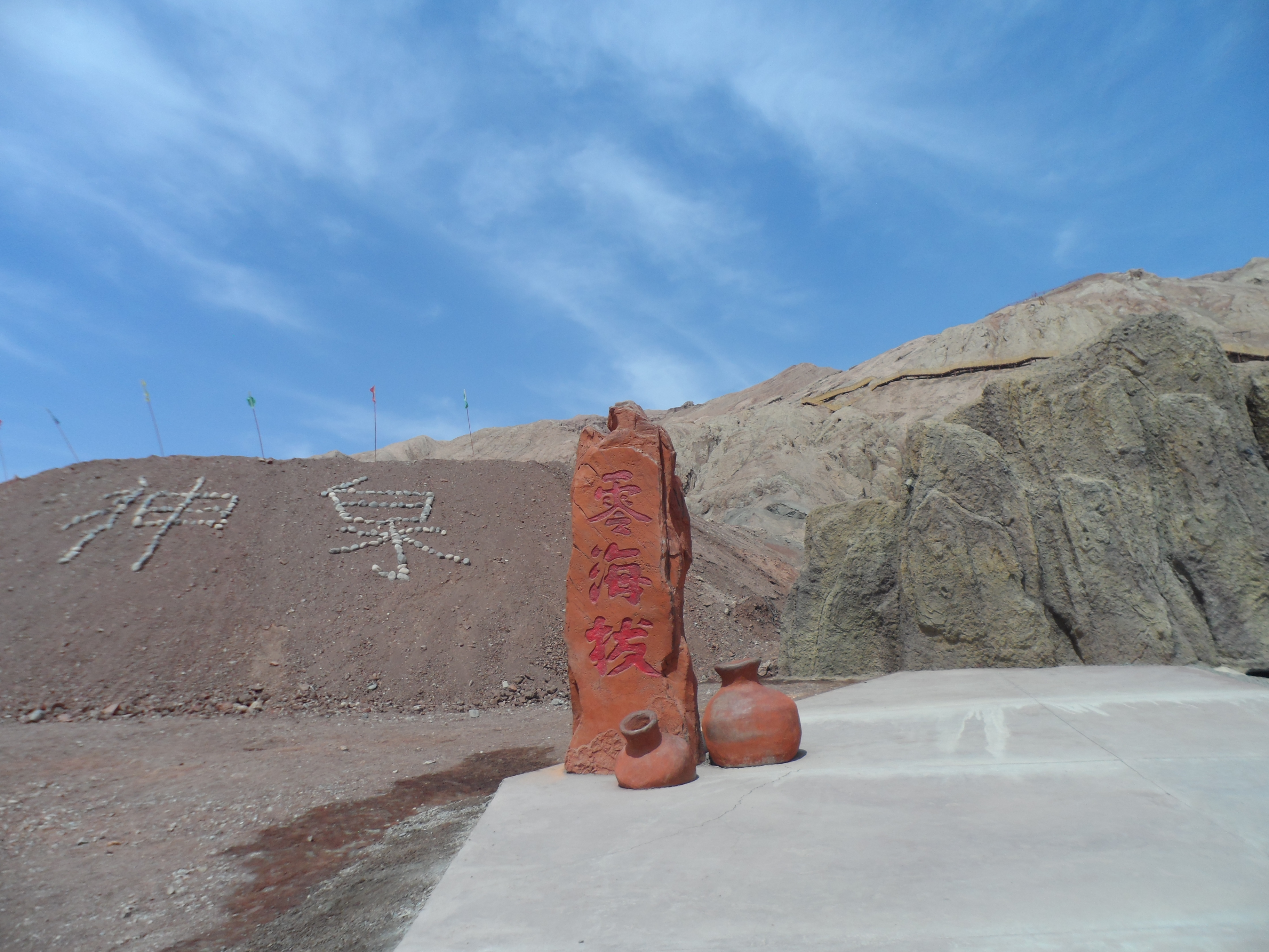 Altitude Zero at Flaming Mountains